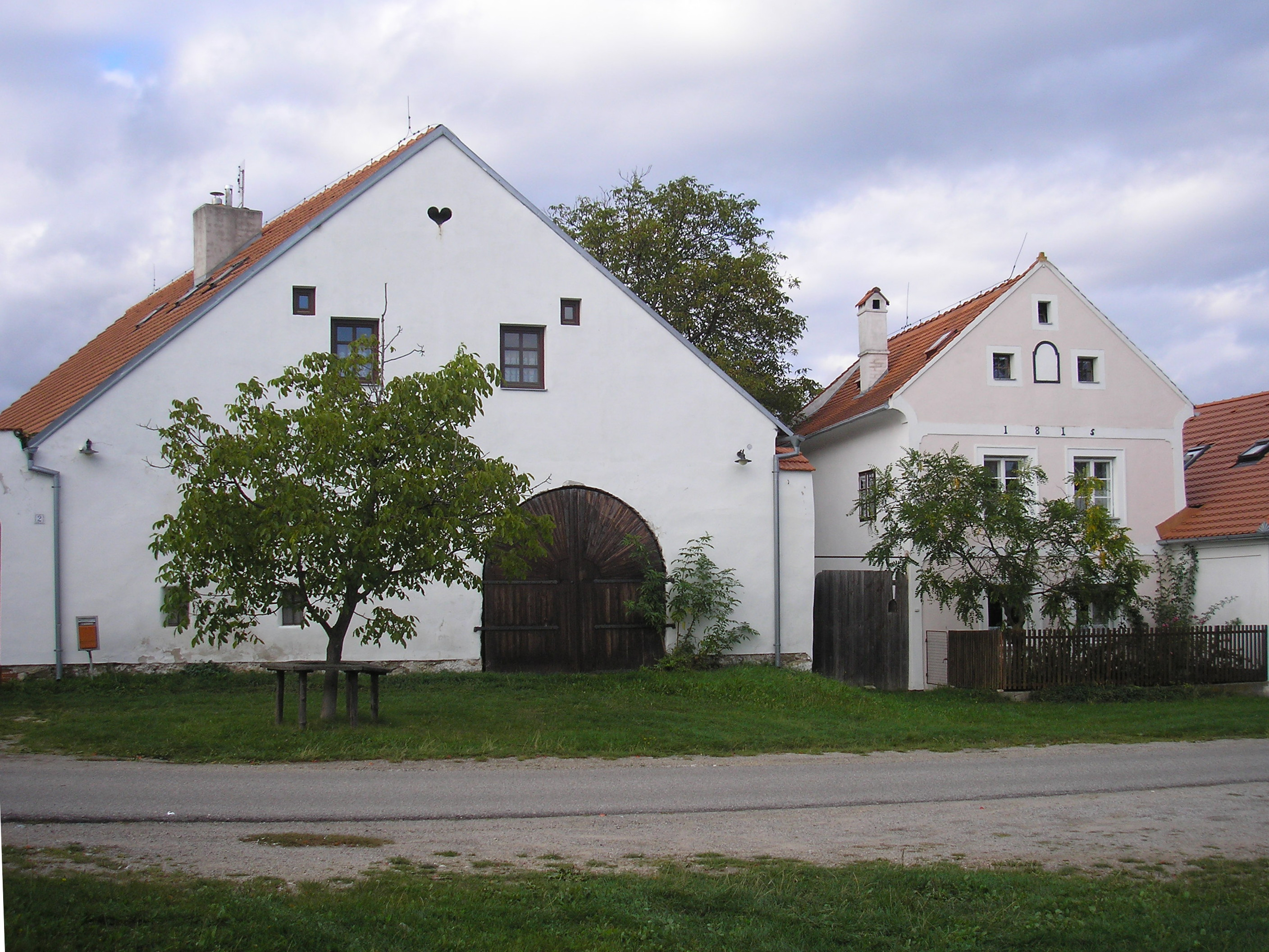 Čertyně, část obce Dolní Třebonín v okrese Český Krumlov